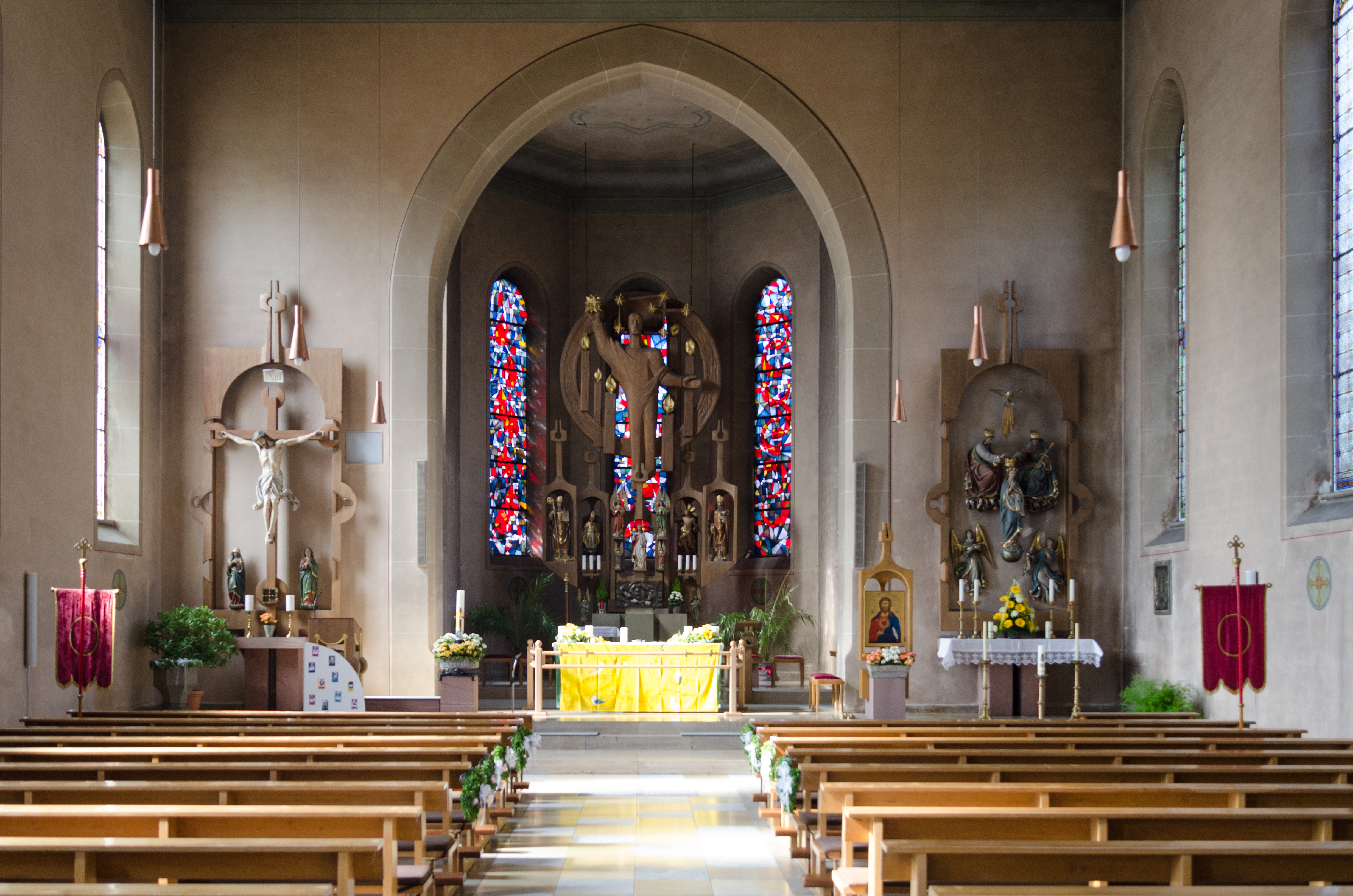 Katholische Pfarrkirche St. Maria in Elfershausen